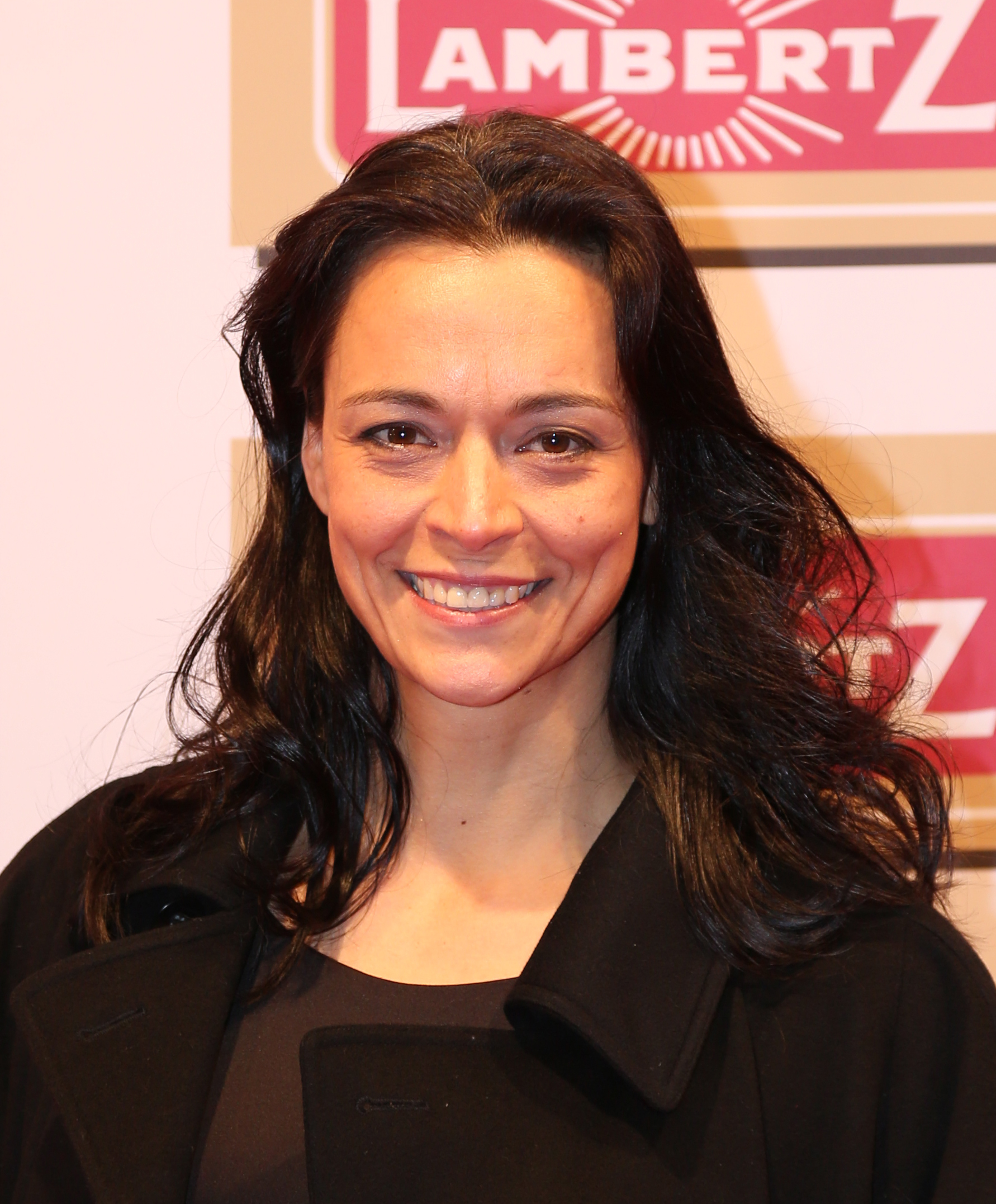 Yvonne de Bark bei der Lambertz Monday Night 2017.